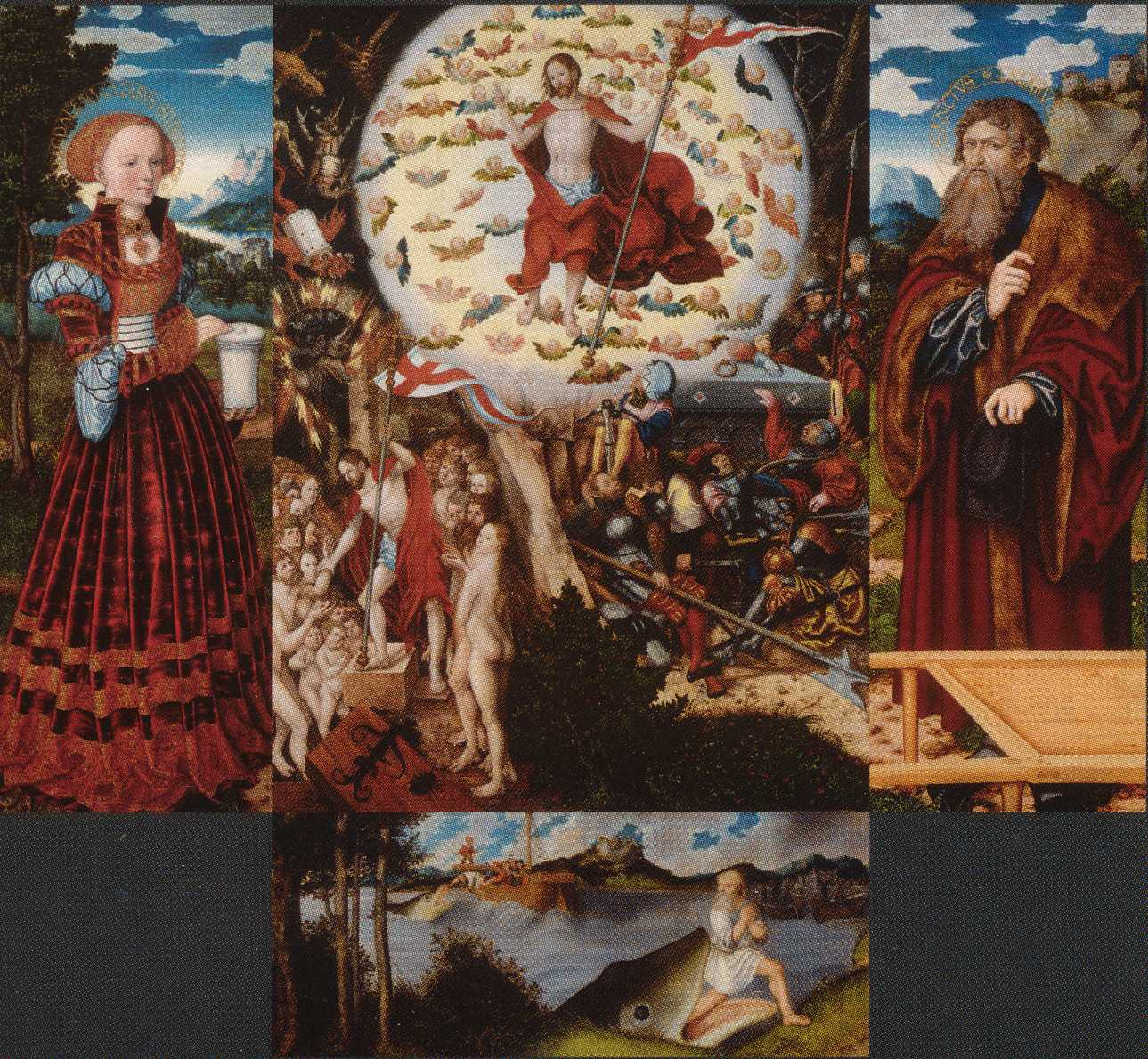 Magdalenenaltar von Lucas Cranach d. Ä., 1520-25 entstanden, Rekonstruktion